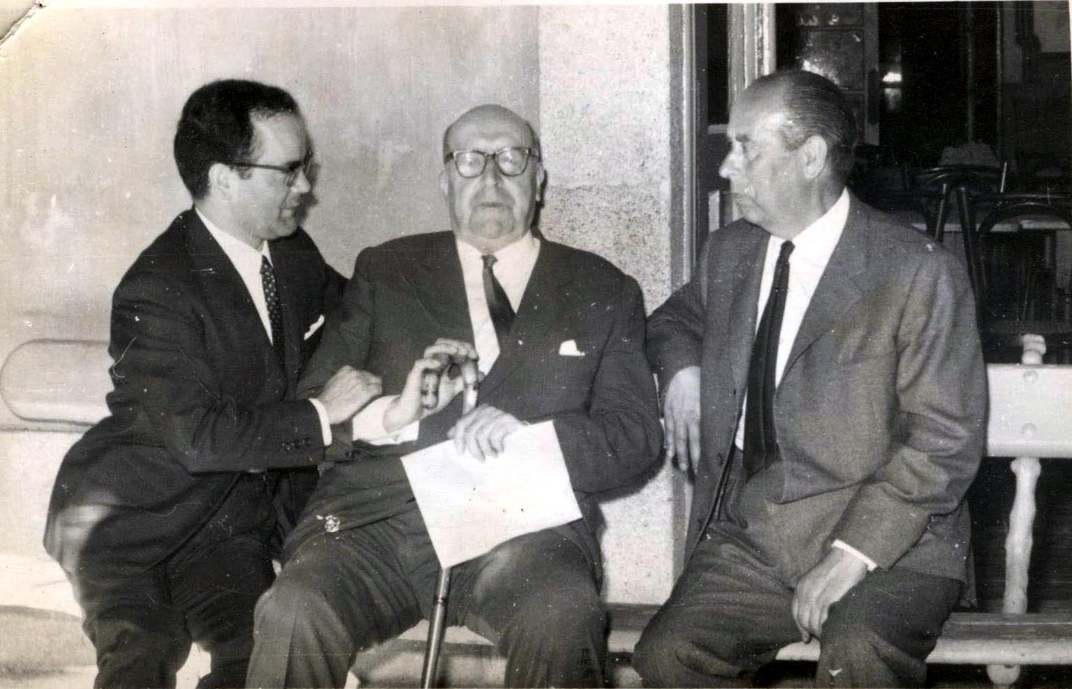 Foto familiar en la que aparecen mi abuelo (José Leyra Domínguez), Ramón Otero Pedrayo y José Antonio Vázquez Sotelo